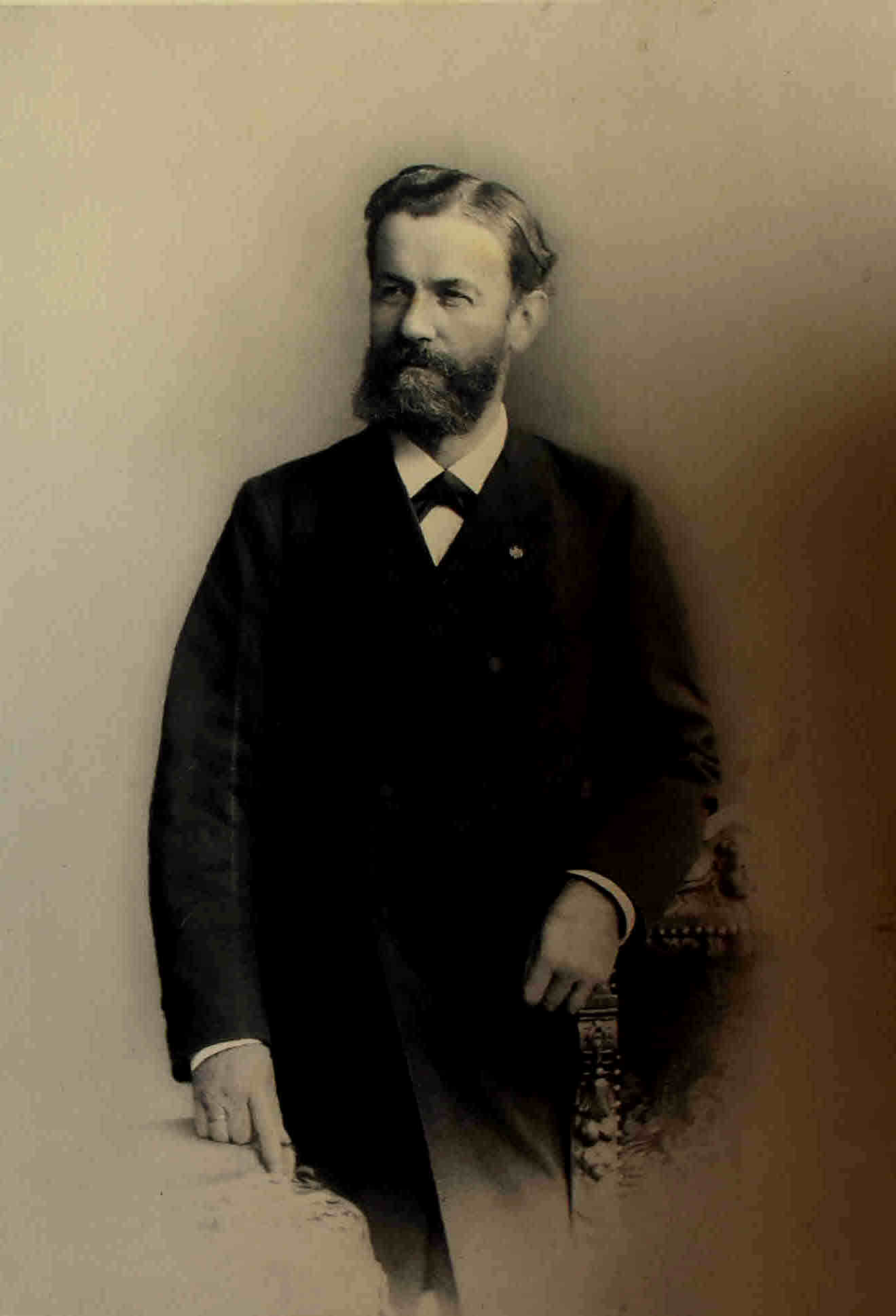 Fotografie von Prof. Dr. med. Friedrich Mosler, Greifswald